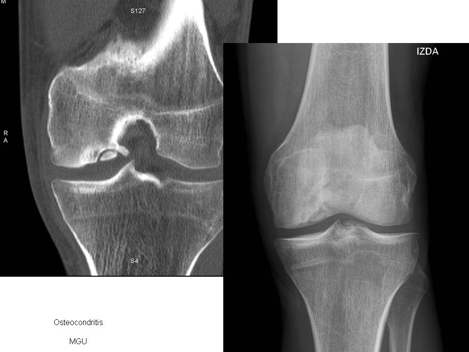 TC y Radiografía simple de rodilla izquierda en varón de 25 años. Cambios degenerativos en cóndilo interno femoral. Imagen lítica articular con tres fragmentos intraarticulares. Osteocondritis disecante.